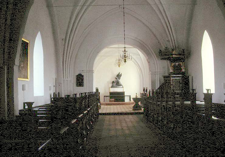 Fodby Kirke i Danmark. Skibet set mod øst